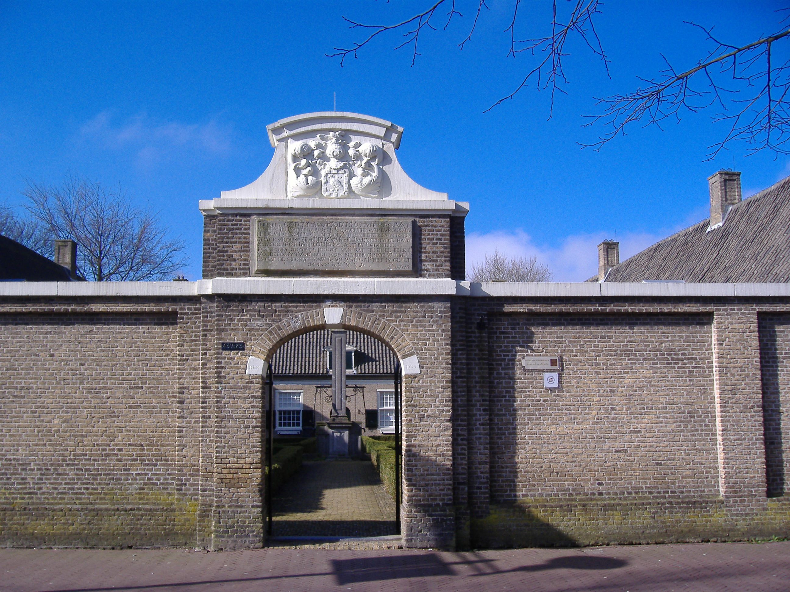 15396 Sint Paulushofje, Etten-Leur 001- ingang aan Markt 43